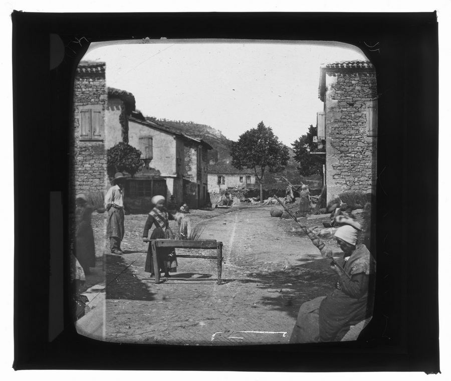 Place dans le village de Cazals (Tarn-et-Garonne). Fin 19e siècle. Vue d'ensemble de la place où se trouvent des paysans. Au premier plan à gauche une femme en costume traditionnel (la "tonio" : coiffure) filant, elle tient une quenouille à la main ; au centre une jeune fille à l'ouvrage sur une teilleuse ; à gauche une homme regardant la scène ; au fond les maisons du village. Mention manuscrite : "La Sargère, coiffée de la vielle tonio"